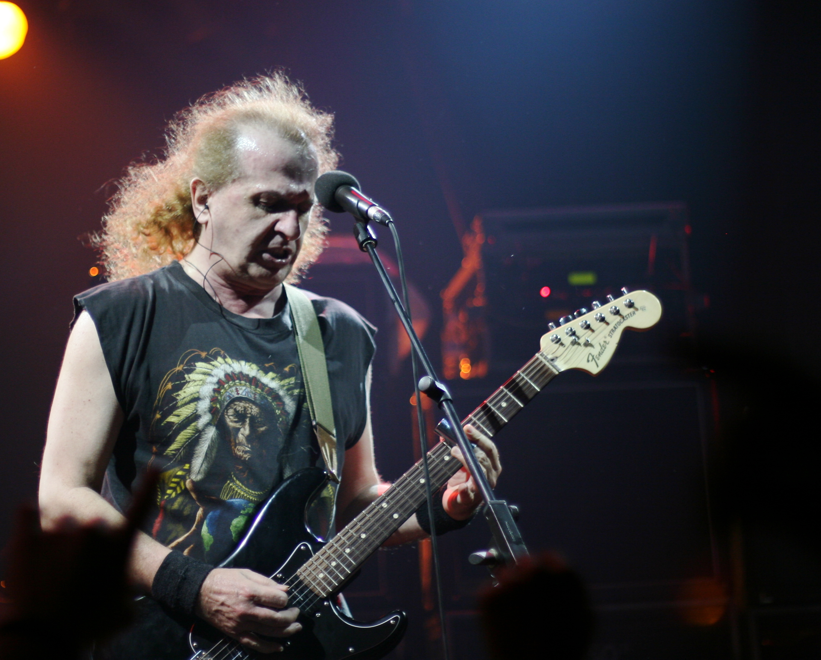 Concierto de Barón Rojo en Barcelona, en la Sala Apolo el 1 de Marzo de 2008.